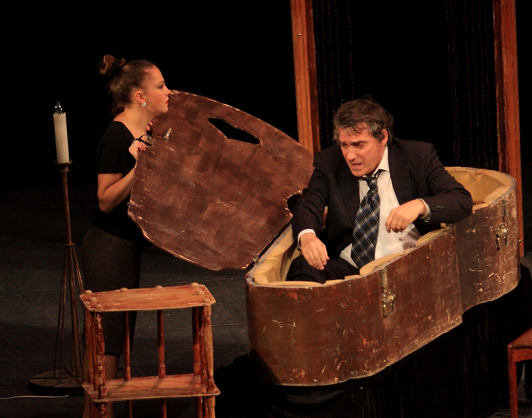 Валерий Борисович Гаркалинов и Лина Иванова в спектакле «Белла Чао»!